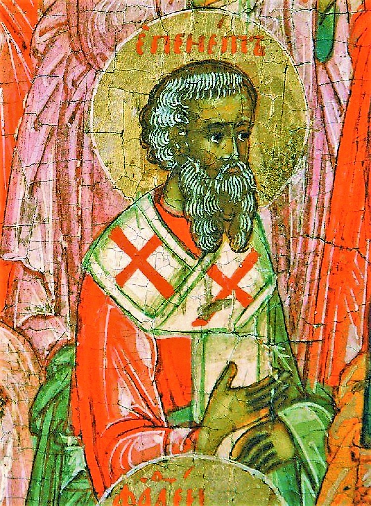 Епенет, апостол от 70. Фрагмент иконы «Апостольское деяние». 1698 г.